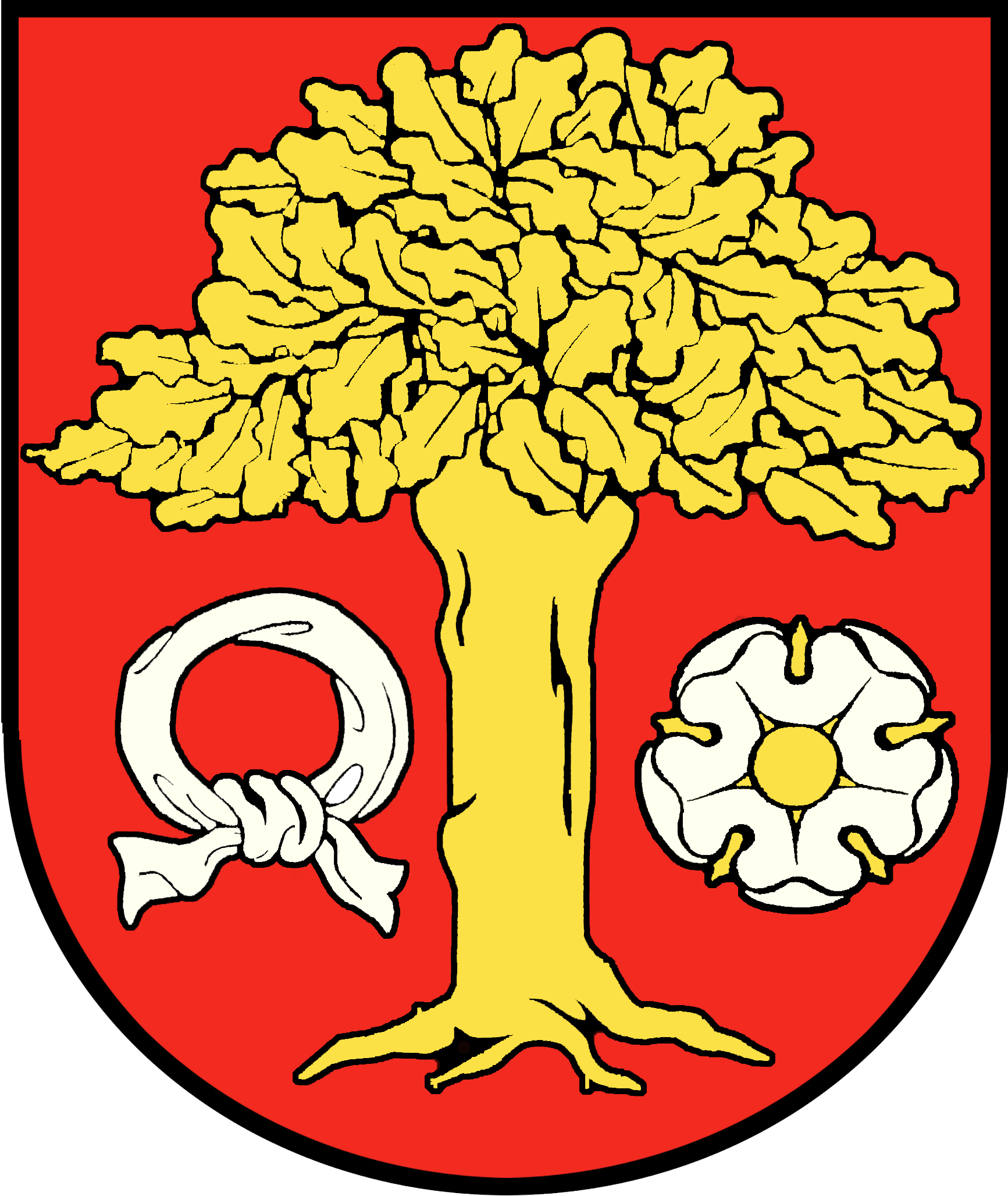 Herb wsi sołeckiej Dębe w powiecie czarnkowsko-trzcianeckim